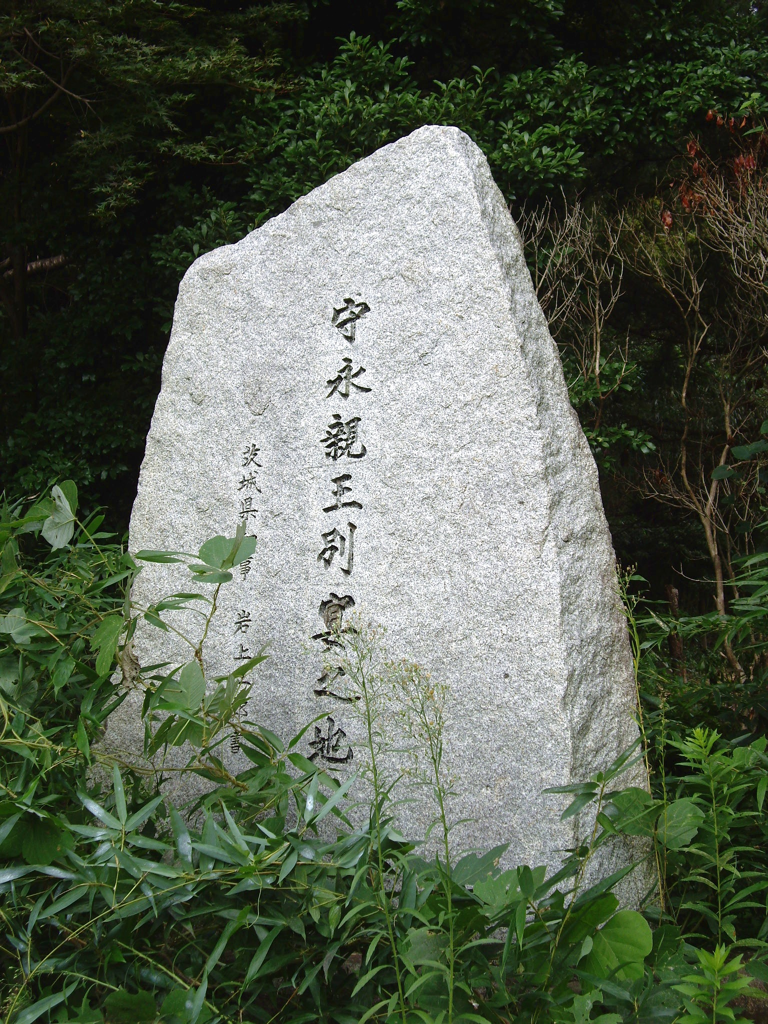 「守永親王別宴之地」碑（茨城県筑西市）